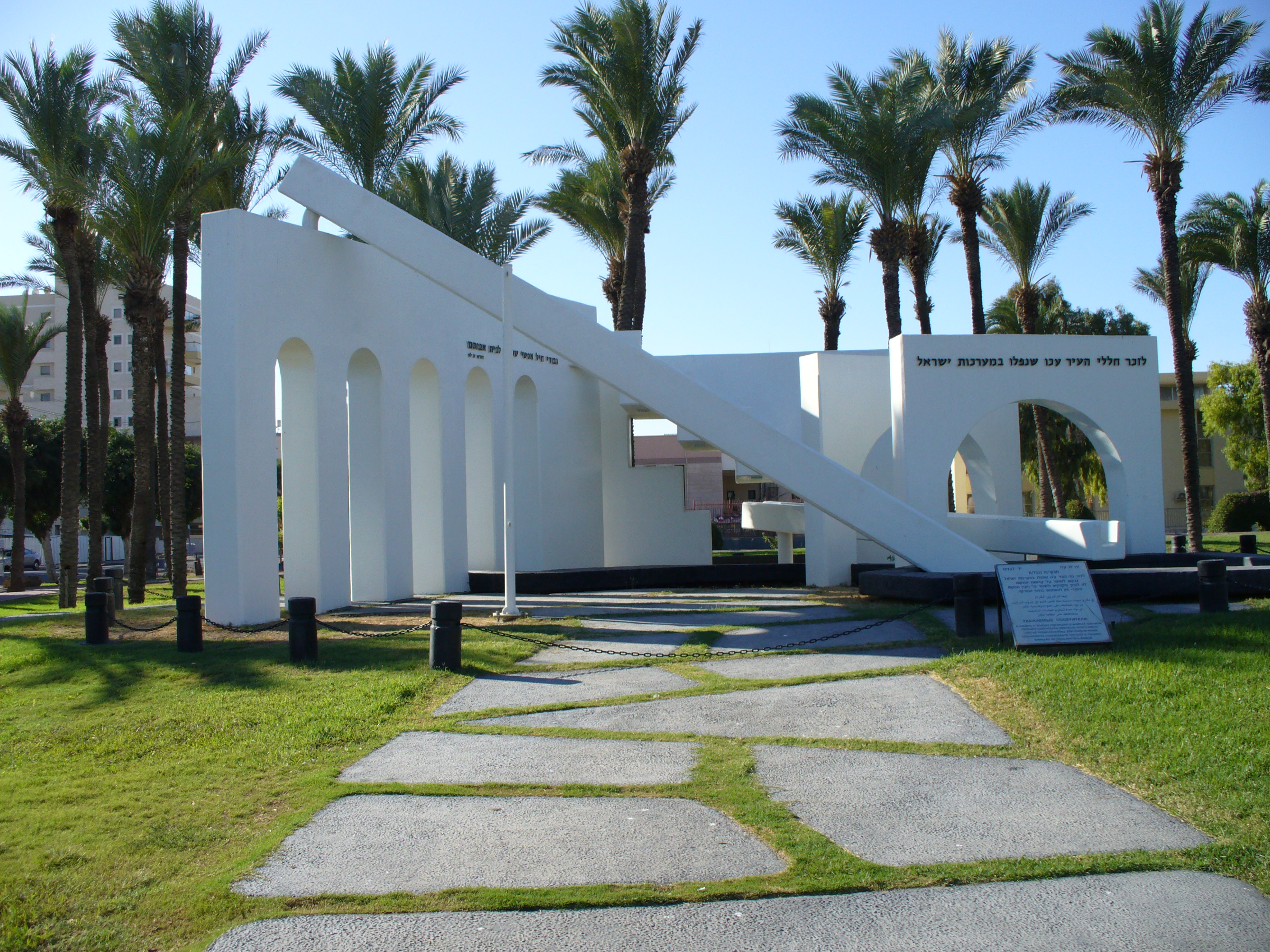 IDF memorial in Akko, Israel